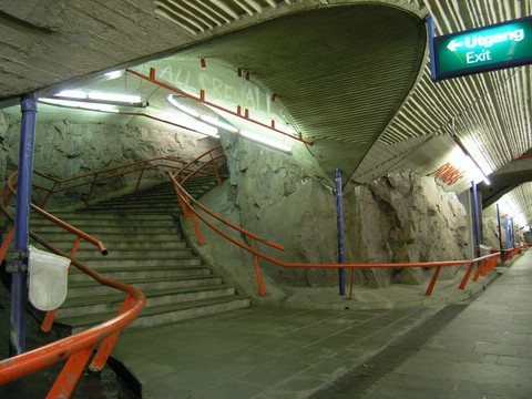 Trappenedgang til østgående perrong. Romsås t-bane. Foto: Jon Rogne 30. aug 2005 kl.21:42 (UTC)